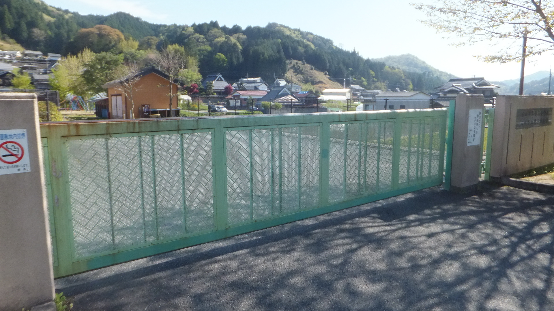 三田市立母子小学校 2014年